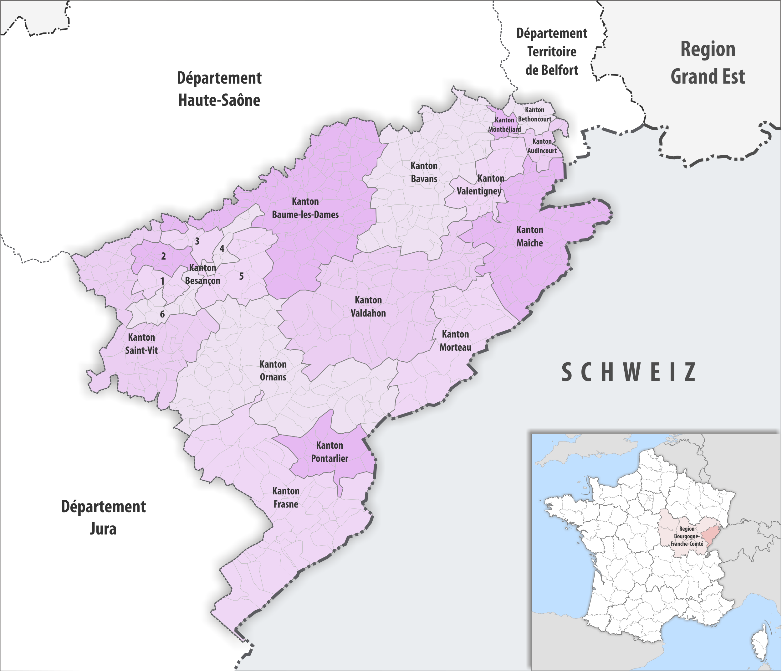 Gemeinden und Kantone im Departement Doubs